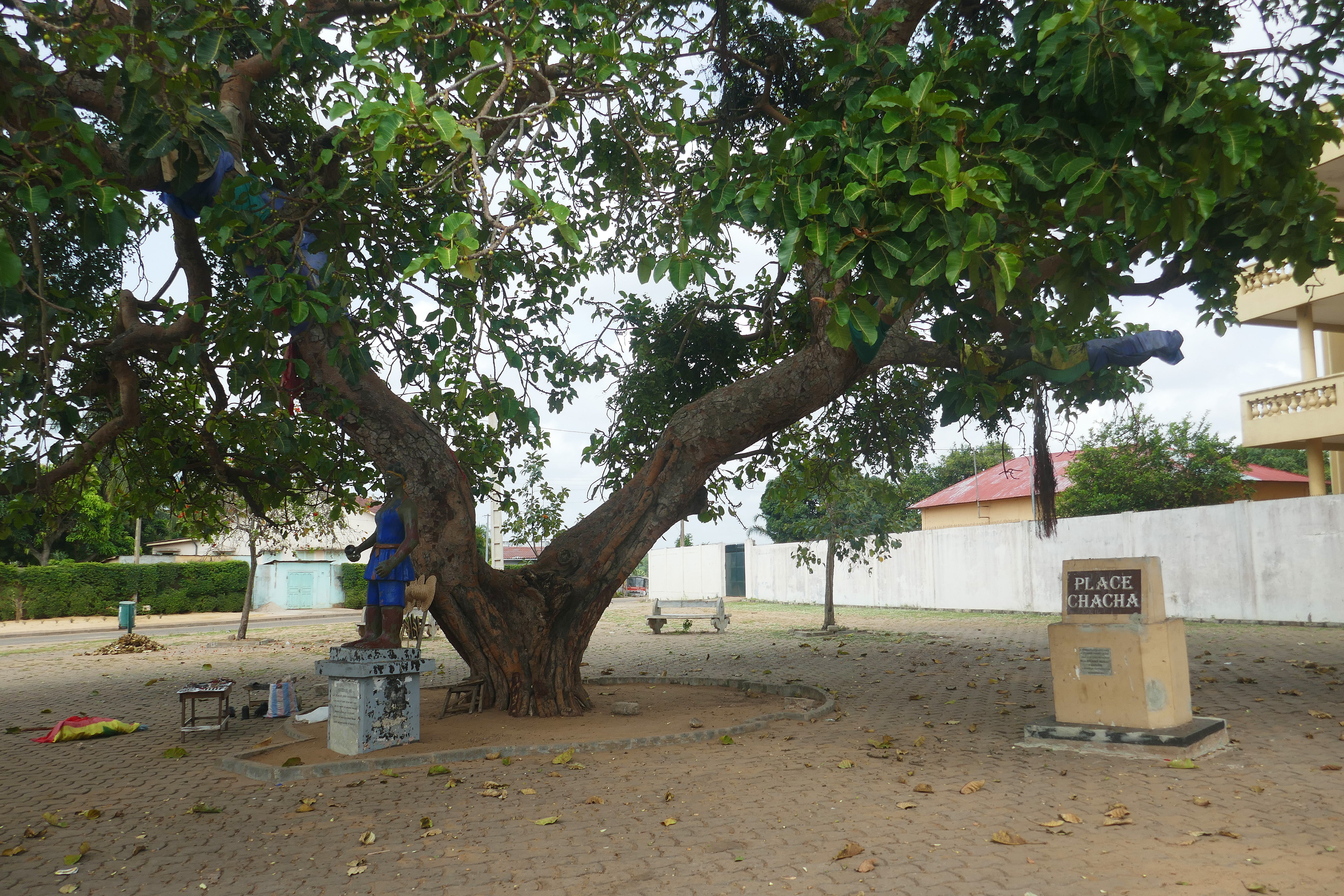 Ouidah (Bénin) : figuier sur la place Chacha, ou place des Enchères. Les esclaves y étaient/auraient été vendus lors d'enchères publiques. La place a été réhabilitée en 1999.